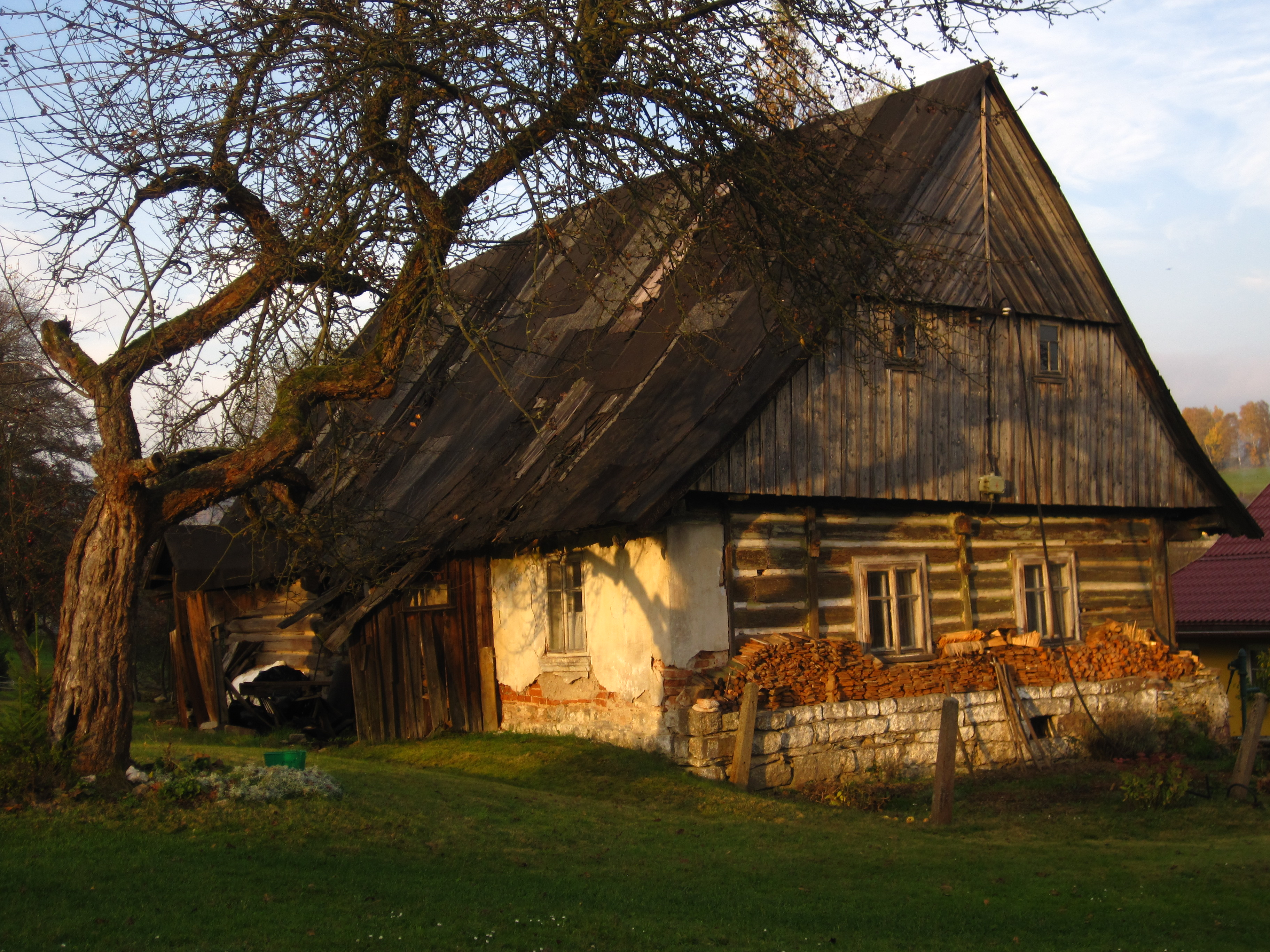 Loužnice - chalupa čp. 7